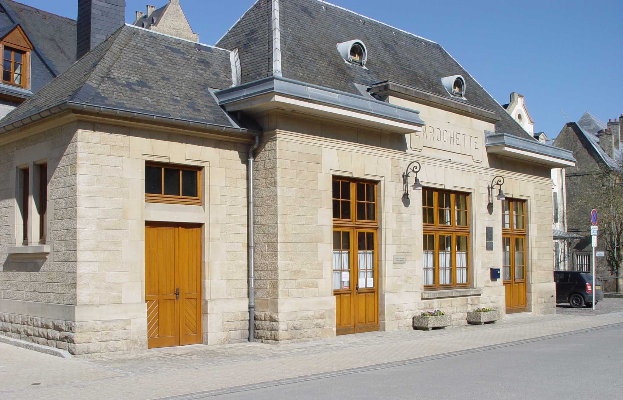 Fiels, déi al Gare. Kategorie:Gemeng Fiels Fiels